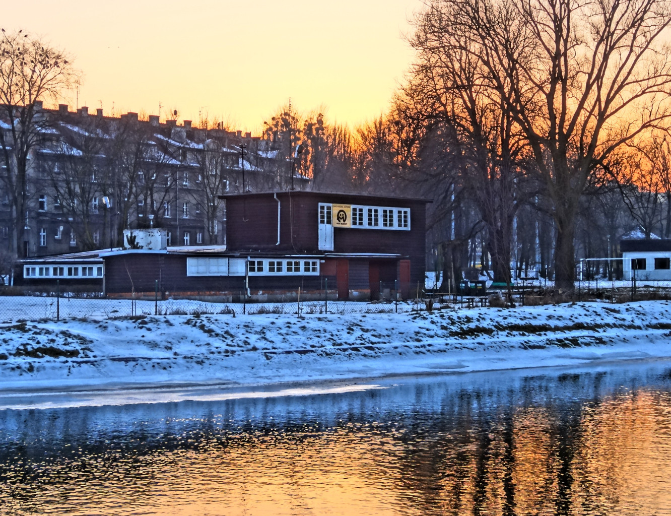 Stanica wodna Kopernik nad Brdą w Bydgoszczy